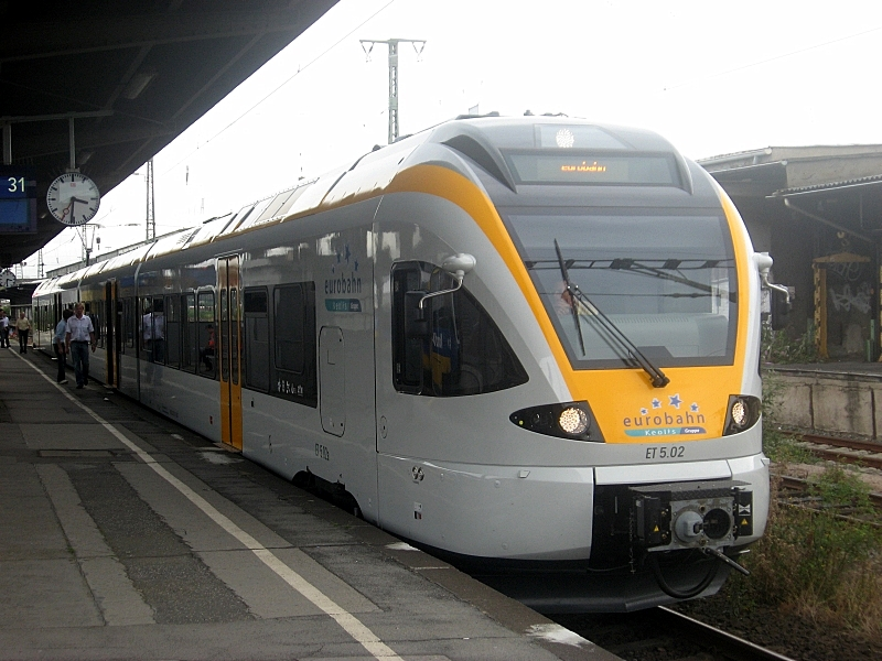 FLIRT der eurobahn am 29.07.2008 auf Präsentationsfahrt